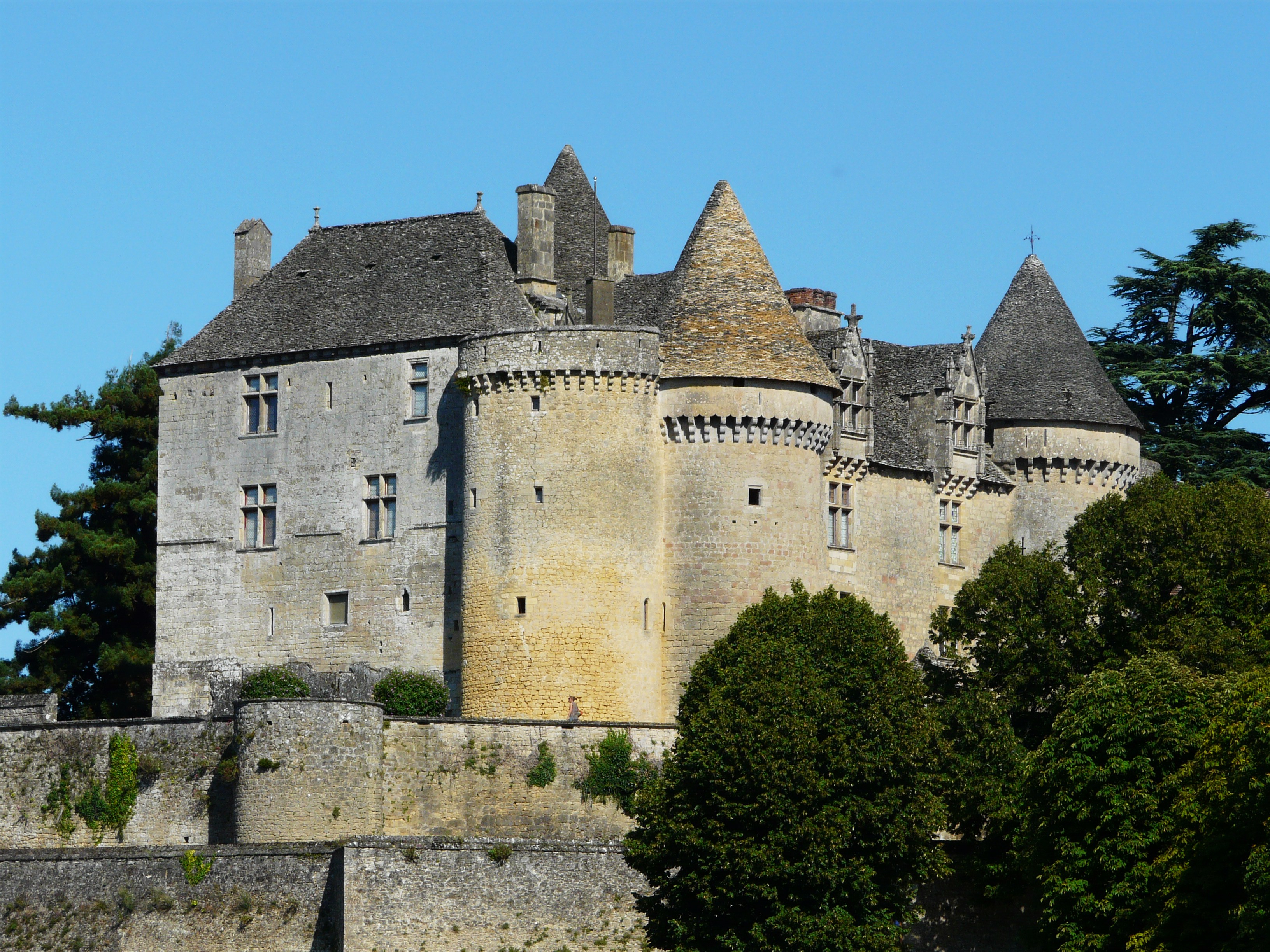 Le château de Fénelon vu depuis l'ouest, Sainte-Mondane, Dordogne, France.